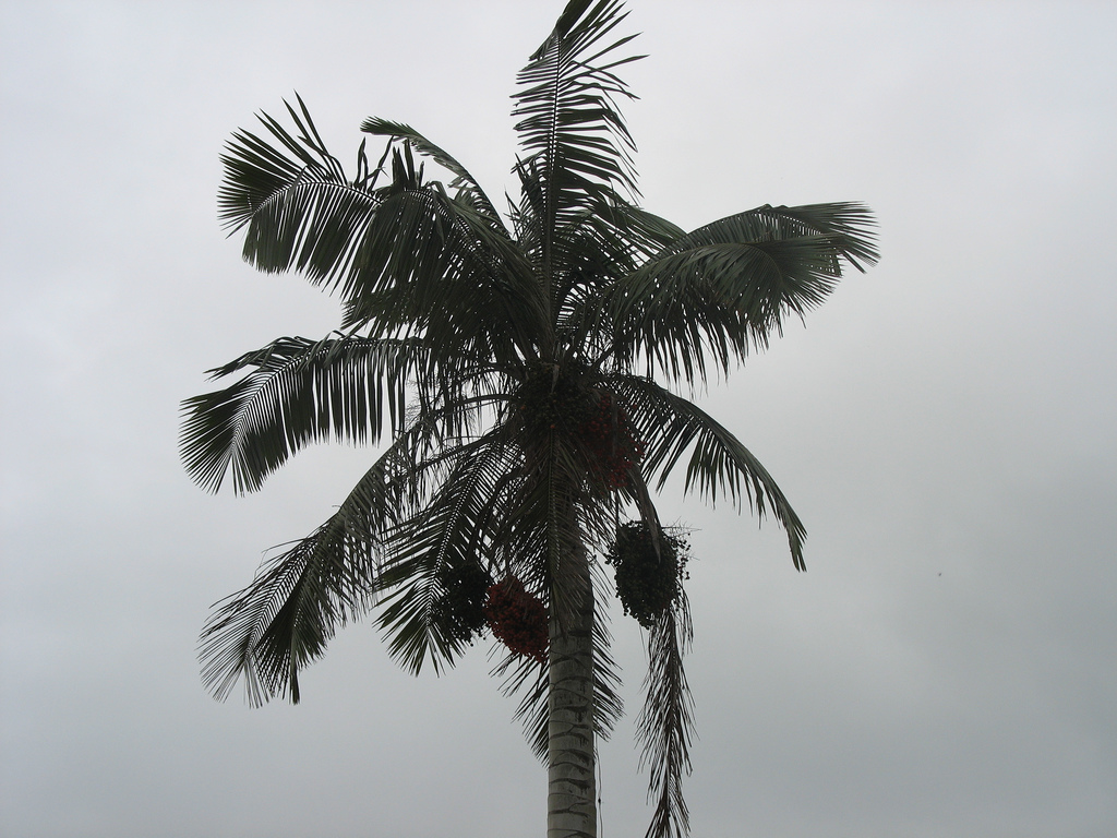 Ceroxylon quindiuense El árbol nacional de Colombia en Salento, Quindío. Esta foto fue tomada por Ángela Quintero